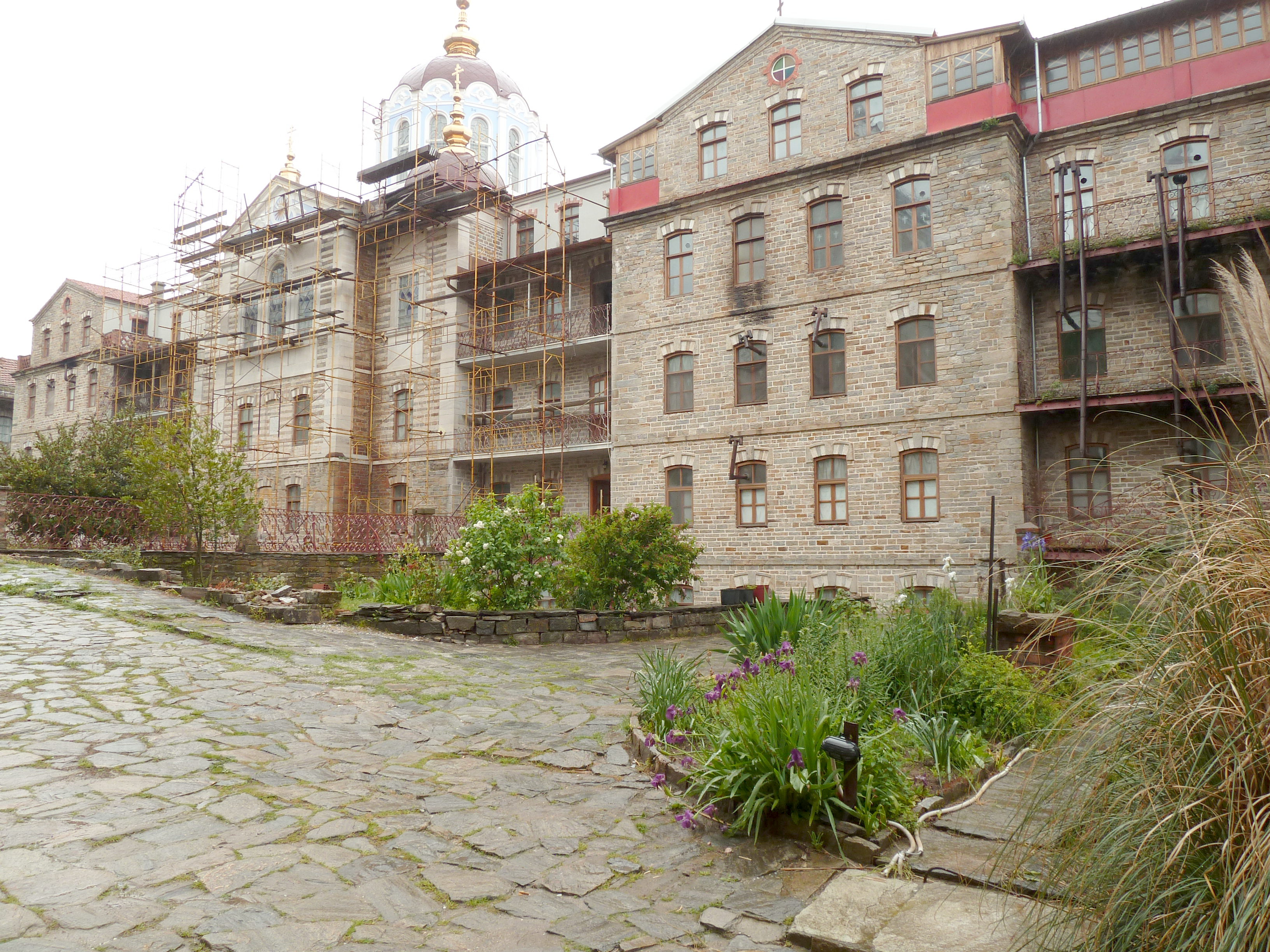 Cour intérieure de la Skite Saint André (Karyes, Mont Athos)